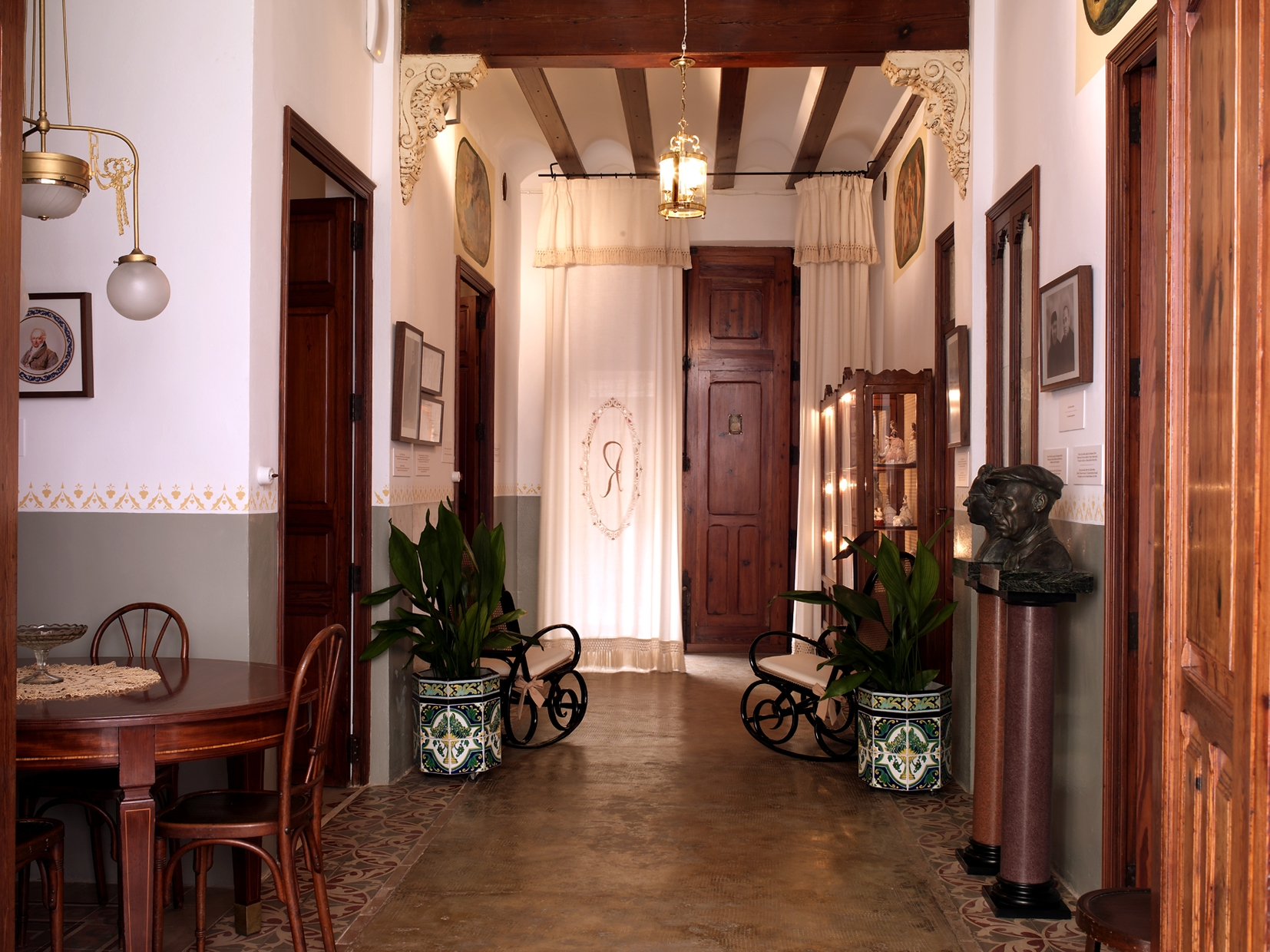 Vista de la entrada de la casa natal de los hermanos Lladró en Almàssera (Valencia, España)